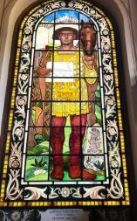 Ultimo Duca di Milano Ludovico Maria Sforza, 1452 - 1508 Foto ripresa nella corte di palazzo Civico, Municipio di Bellinzona